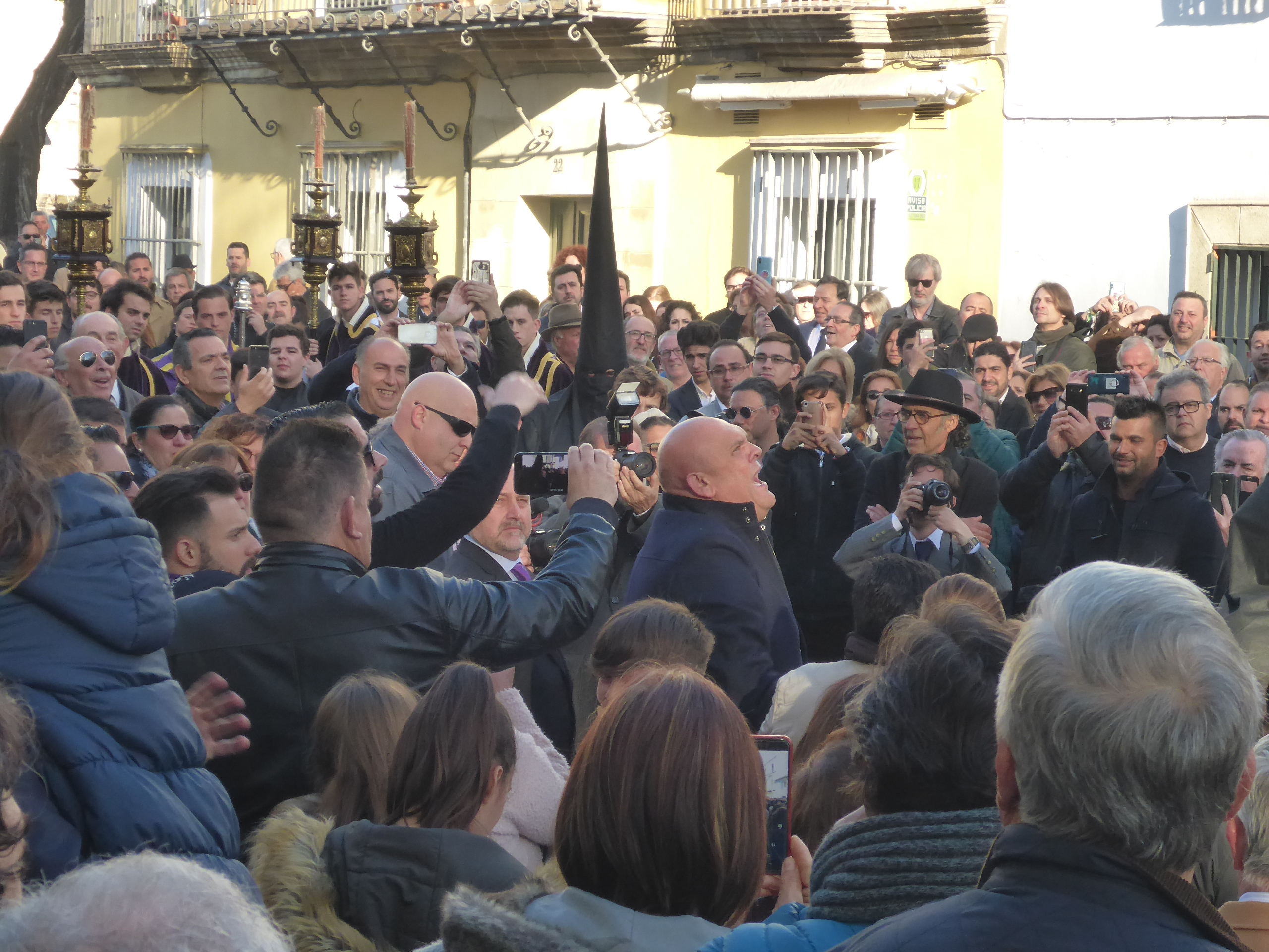 Viernes Santa 2019 en Jerez de la Frontera (Andalucía, España)